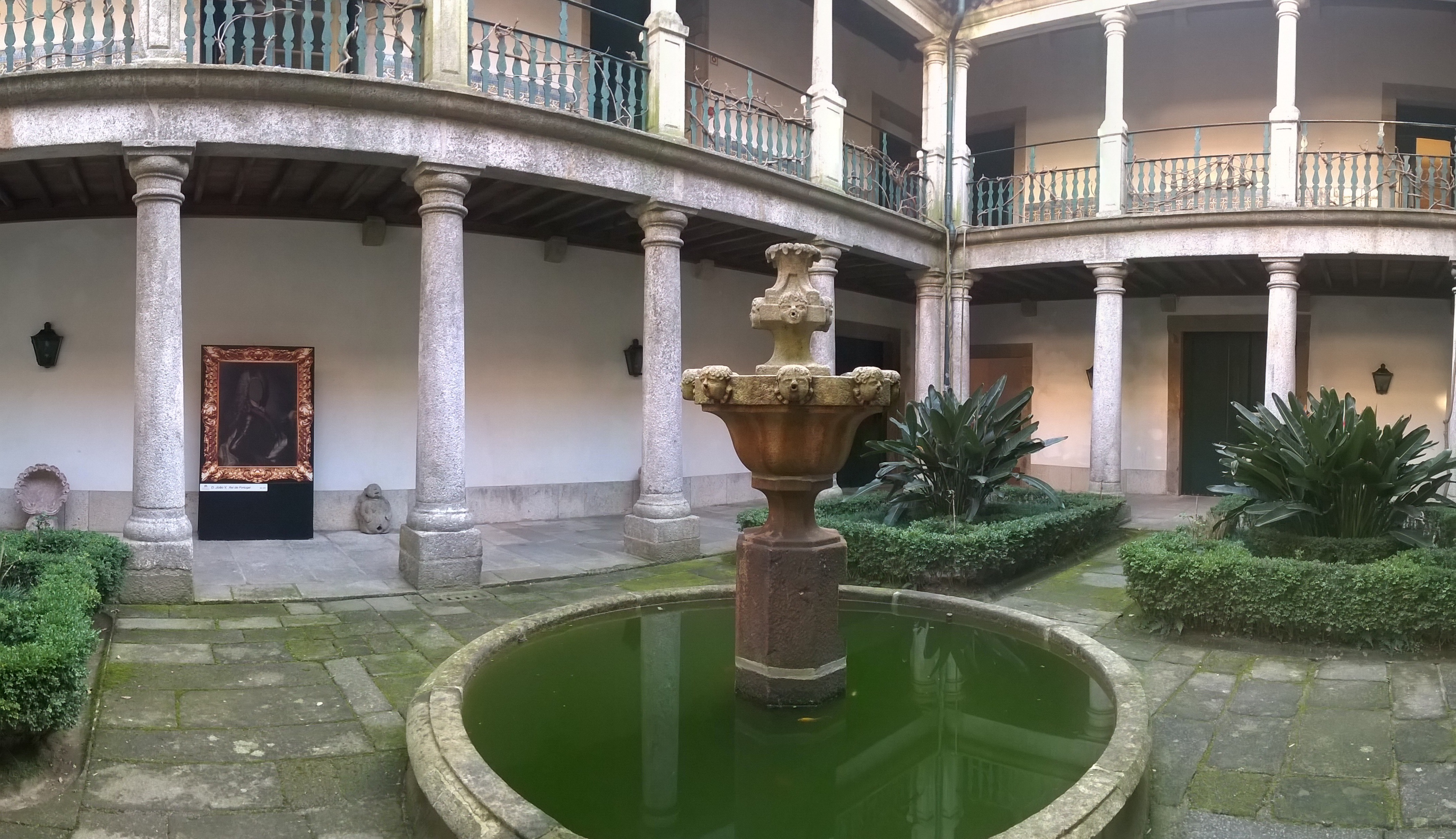 Claustros do Palácio dos Biscainhos